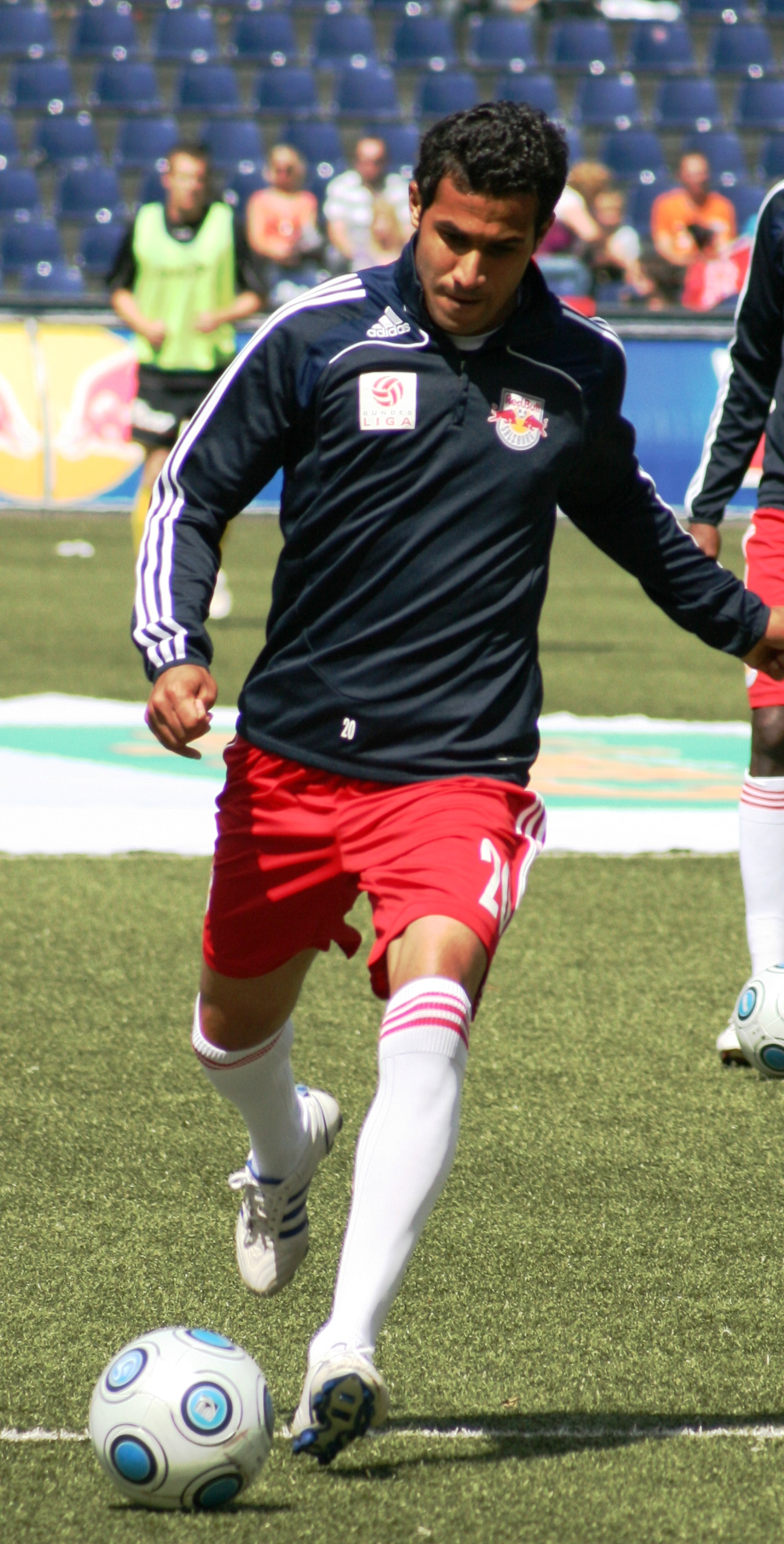 Anis Boussaidi